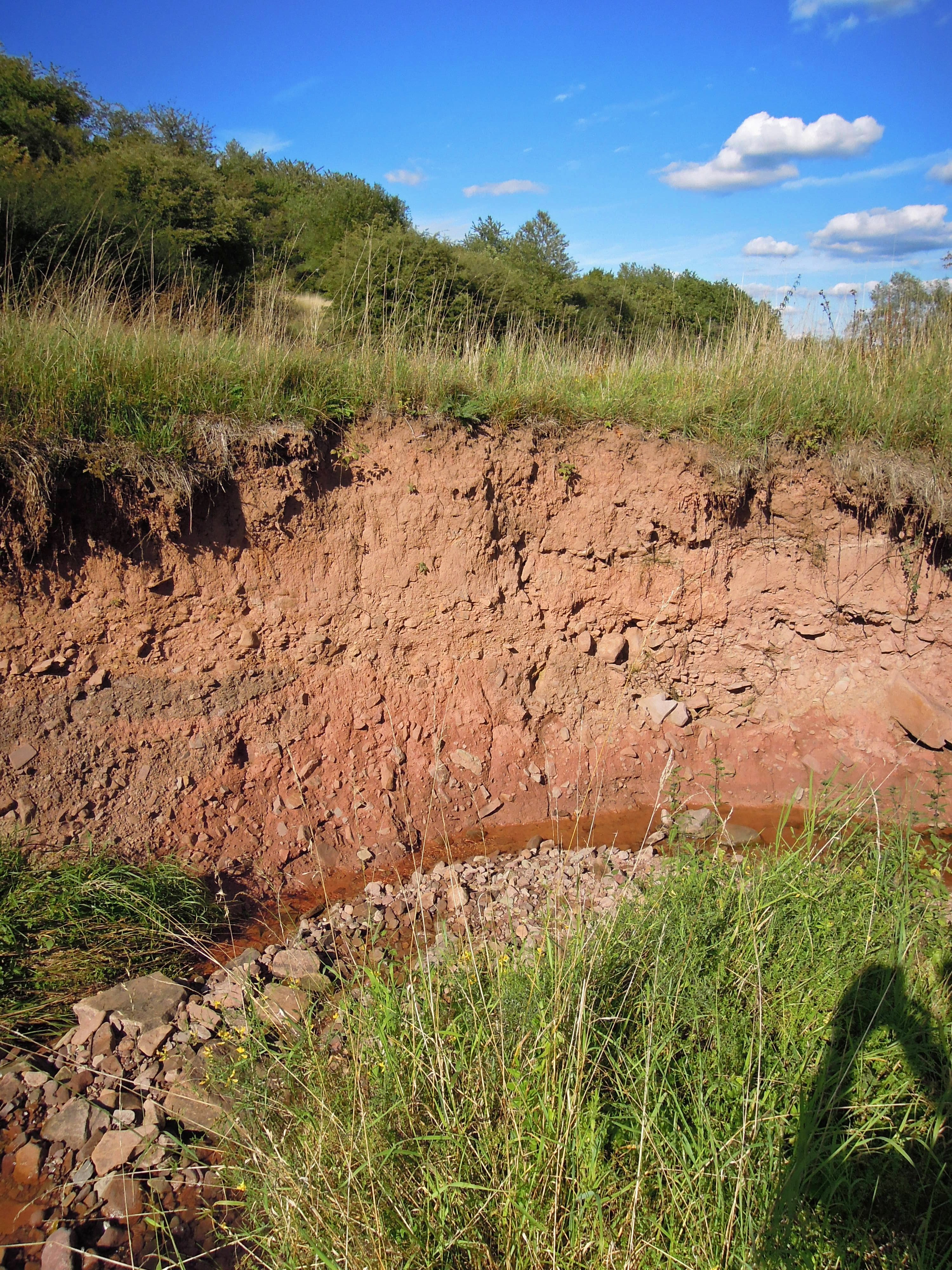 Durch Erosion seit dem Autobahnbau um 1970 trotz Auffangbecken etwa 2m tief eingeschnittene Merch